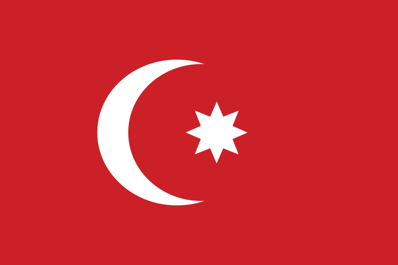 علم الأسطول العثماني في الفترة ما بين 1793 و 1844